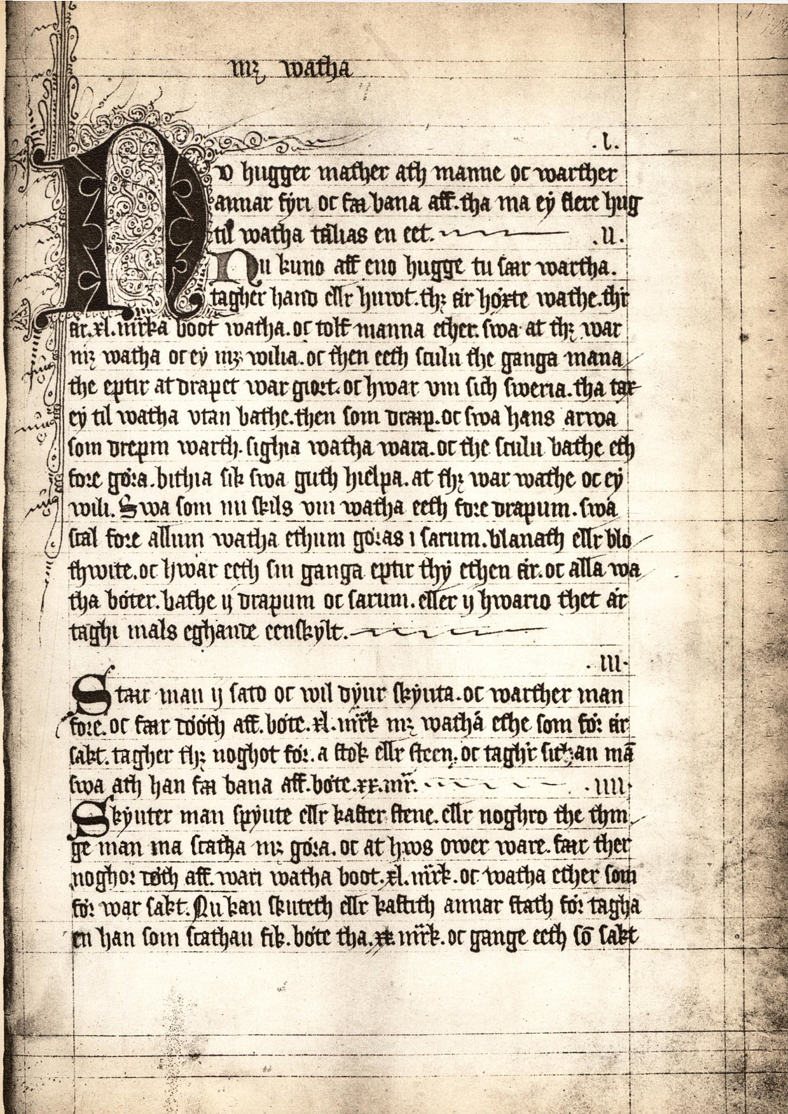 Magnus Erikssons stadslag, excerpt